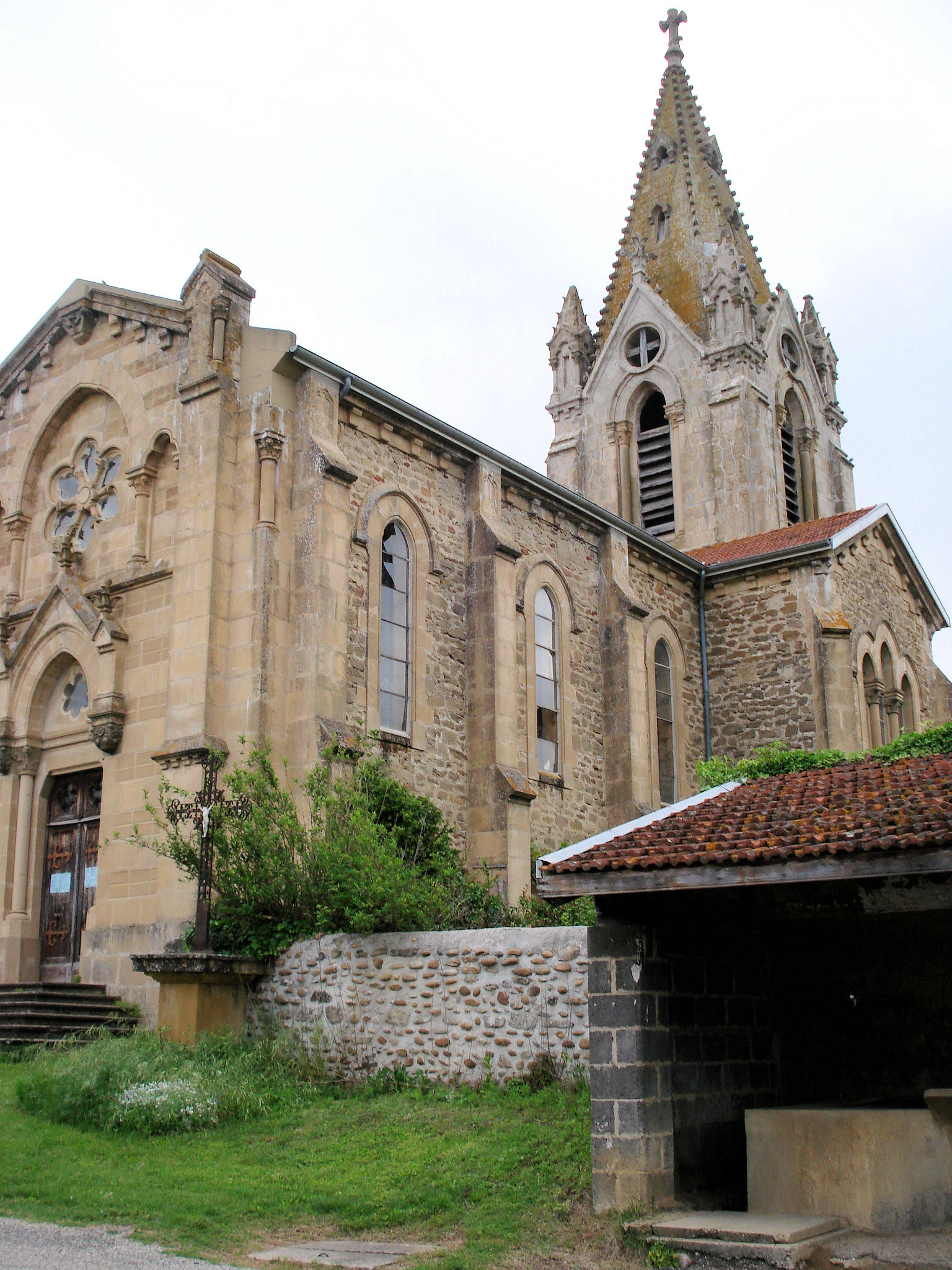 église de Saint-Bonnet, commune de Châteauneuf-de-Galaure dans la Drôme